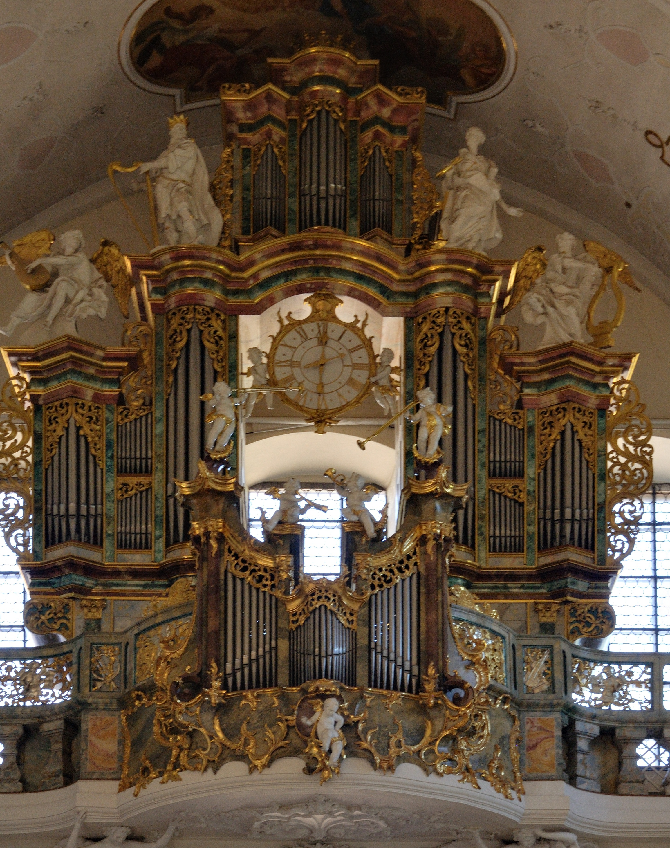 Klosterkirche St. Peter im Schwarzwald